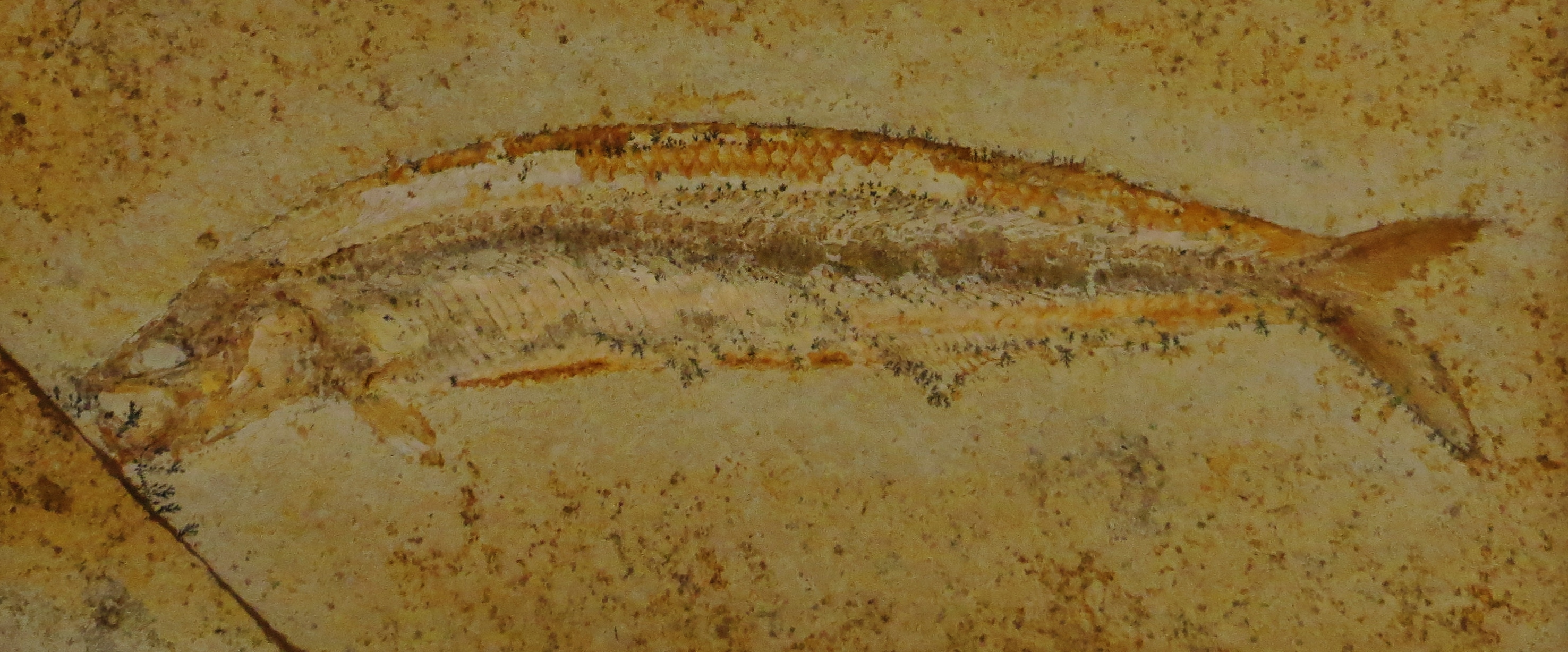 Took the picture at Museum Berger, Eichstaett